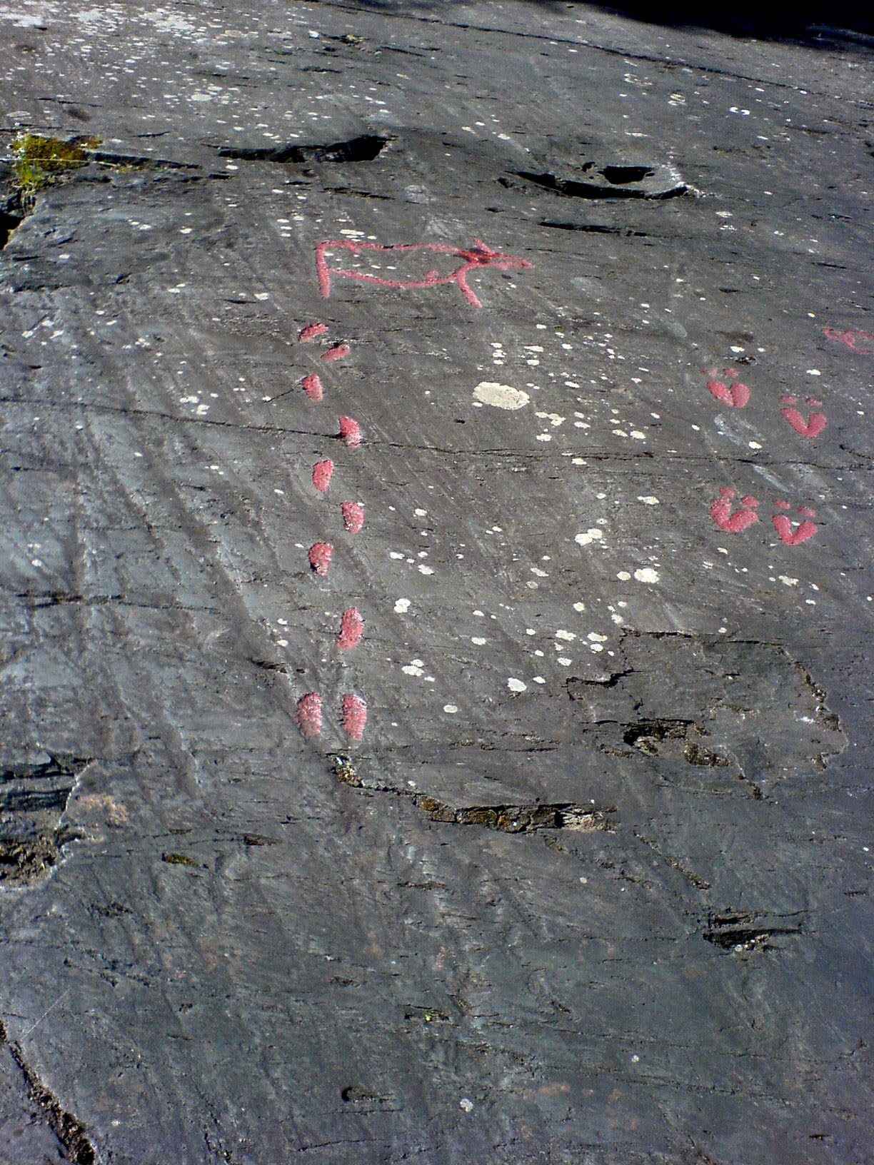 Hällristningar föreställande en älg och fotspår vid Gärde i Krokoms kommun, Jämtlands län, Sverige.